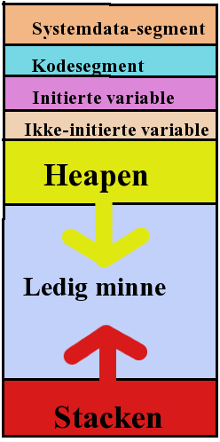 Oversikt over en prosess' bruk av minne